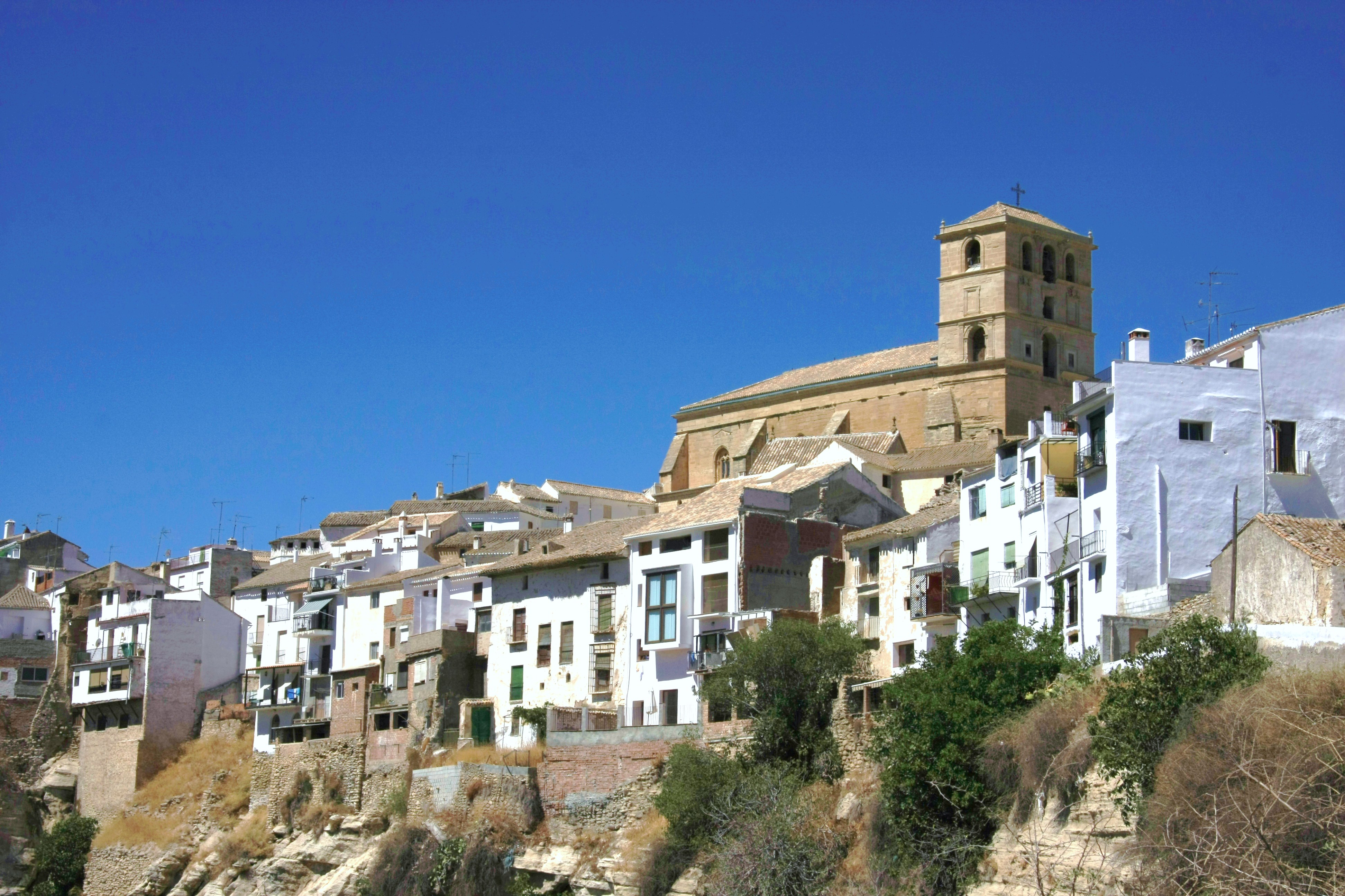 Comarca of Alhama de Granada